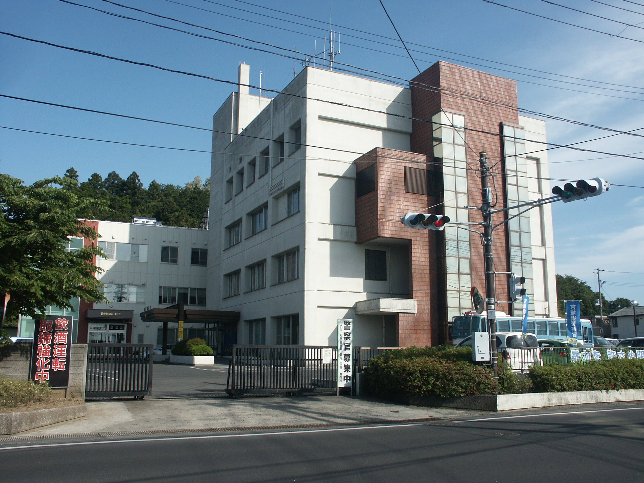 宮城県石巻警察署庁舎